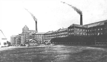 Фабрика Переславской мануфактуры в Переславле-Залесском